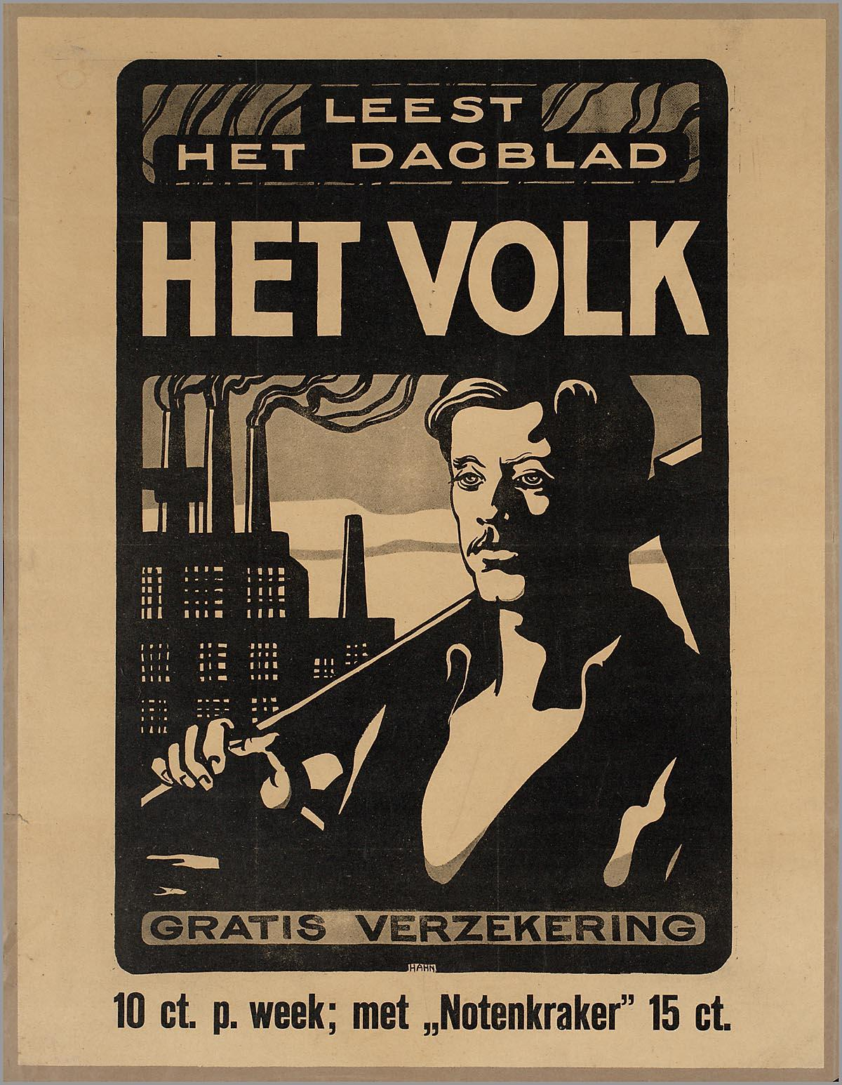 Affiche: Leest het dagblad Het Volk